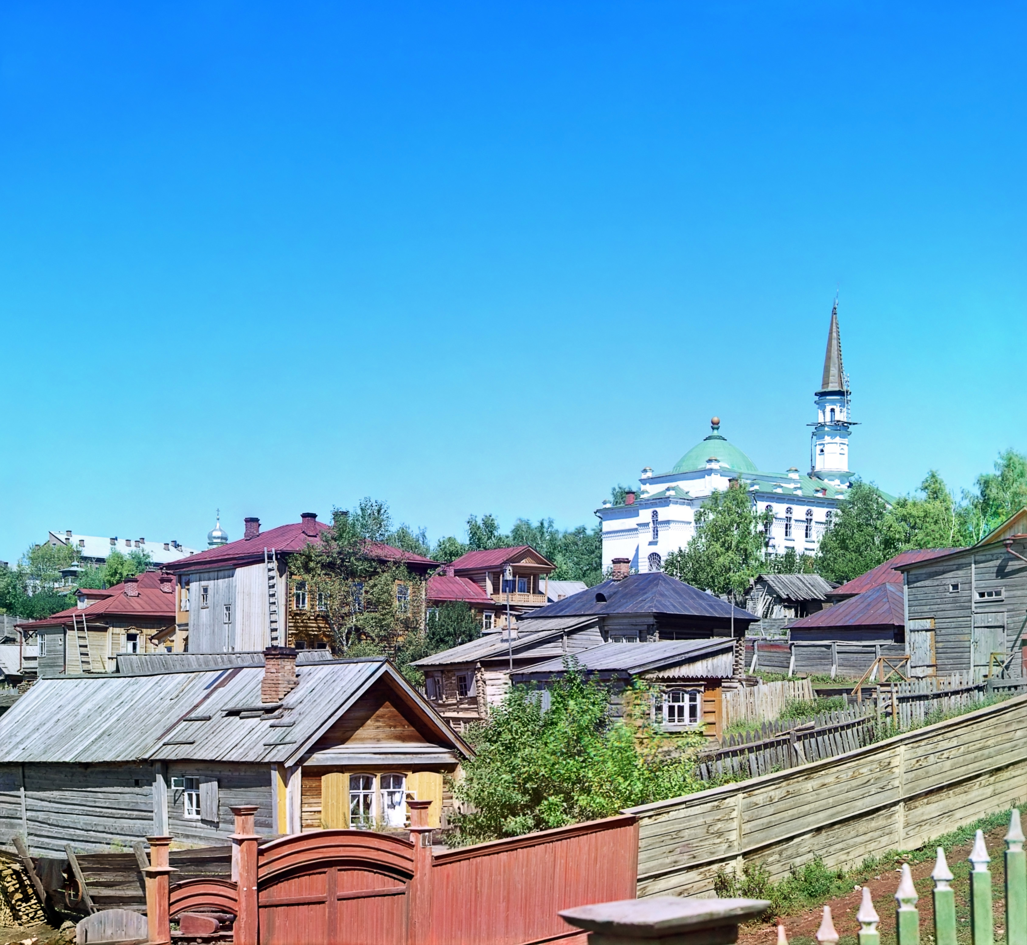 Главная мечеть Уфы (Местожительство муфтия). 1910 год. Фотограф:Прокудин-Горский.